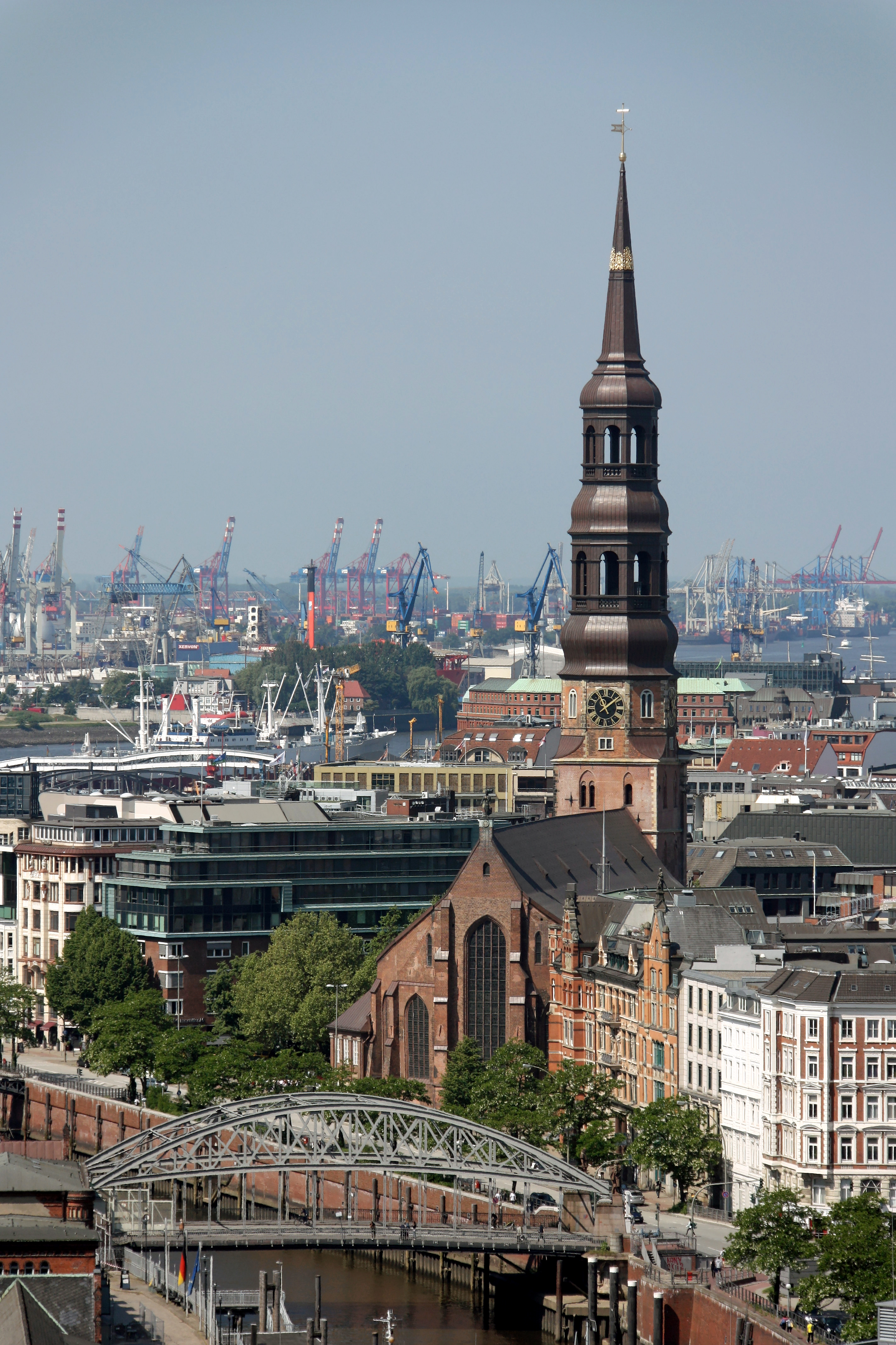 Hamburg, Blick aus dem Fesselballon Highflyer, St. Katharinen This is a photograph of an architectural monument.